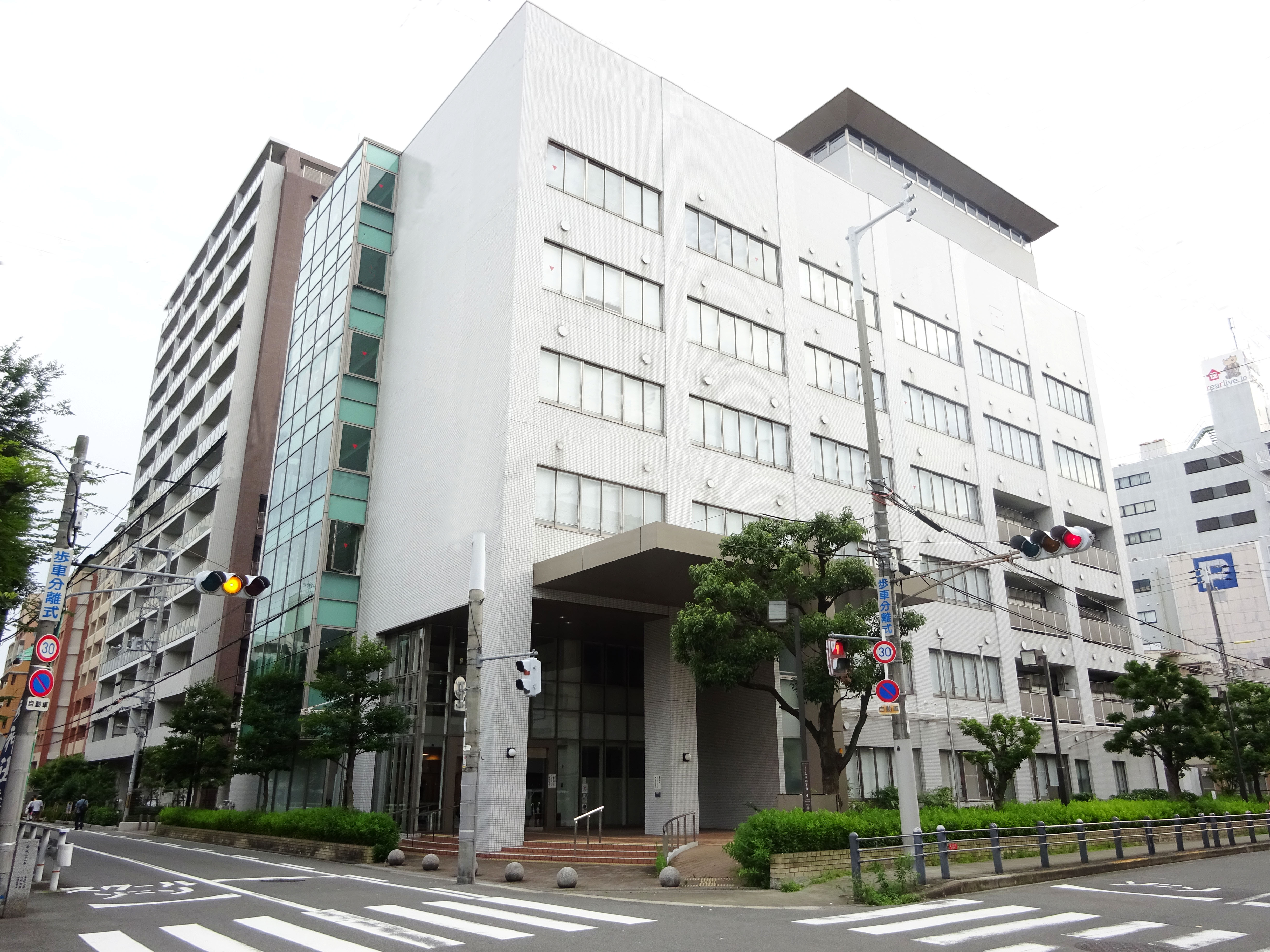 大阪府立夕陽丘高等職業技術専門校